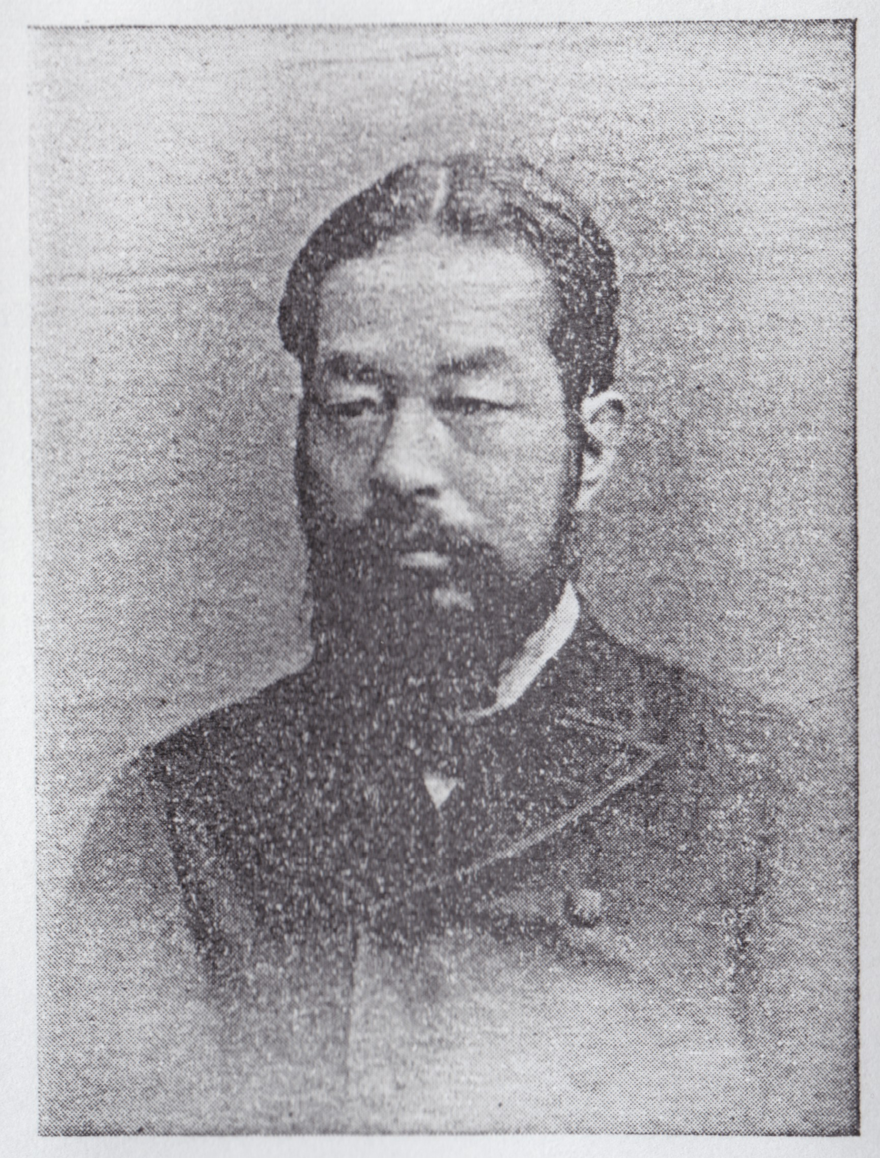 静岡県知事従三位男爵千家尊福の写真